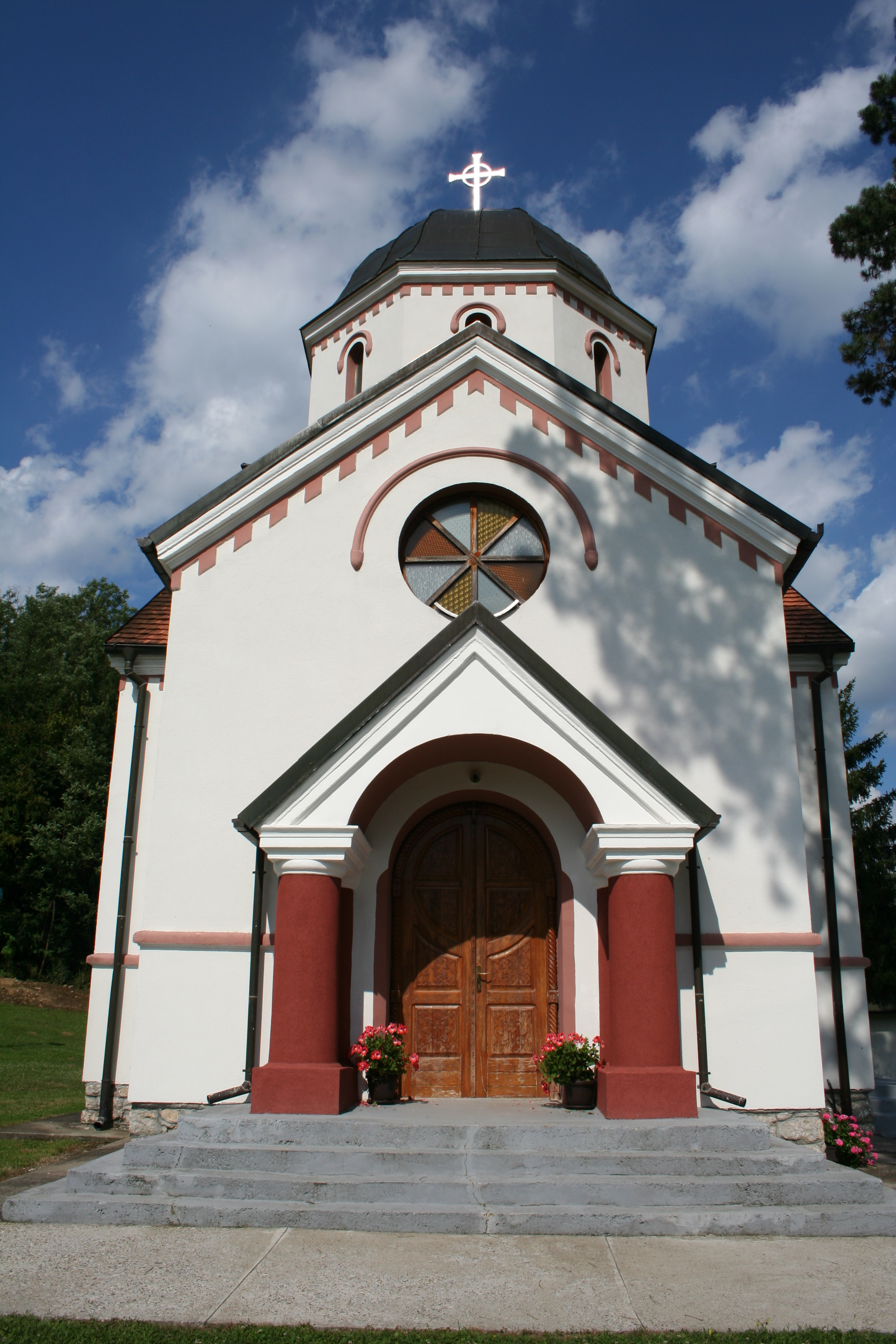 Crkva Sv. Trojice, Donja Badanja